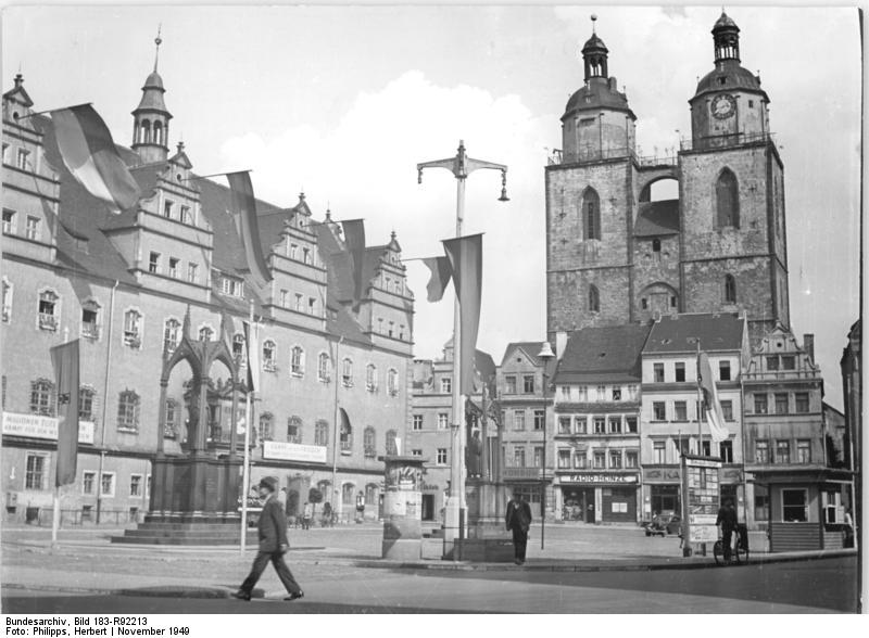 Wittenberg, Marktplatz, Rathaus, Stadtkirche Illus Philipps Nov.49, Lutherstadt Wittenberg auf dem Marktplatz 4514-49